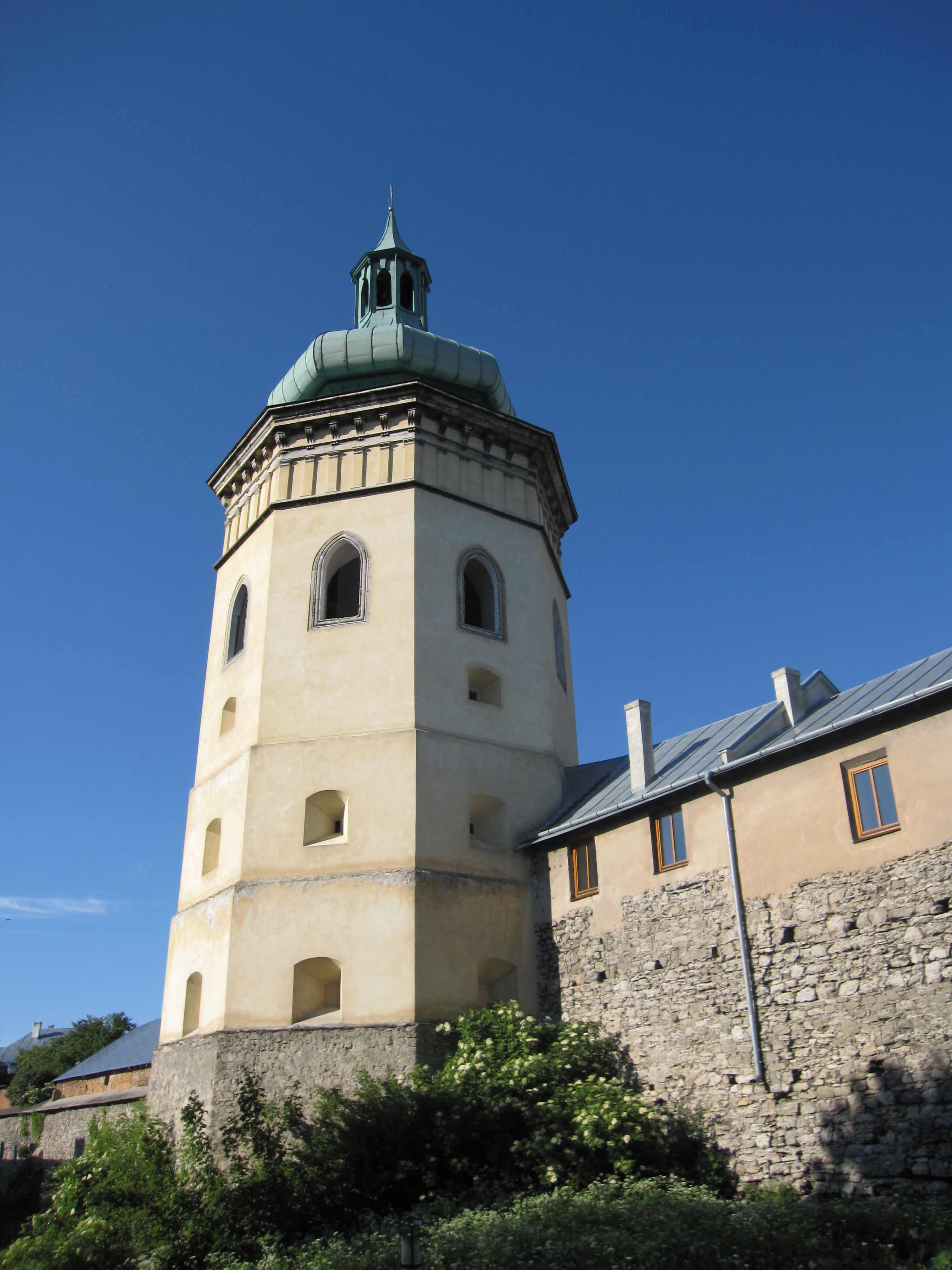 Zhovkva